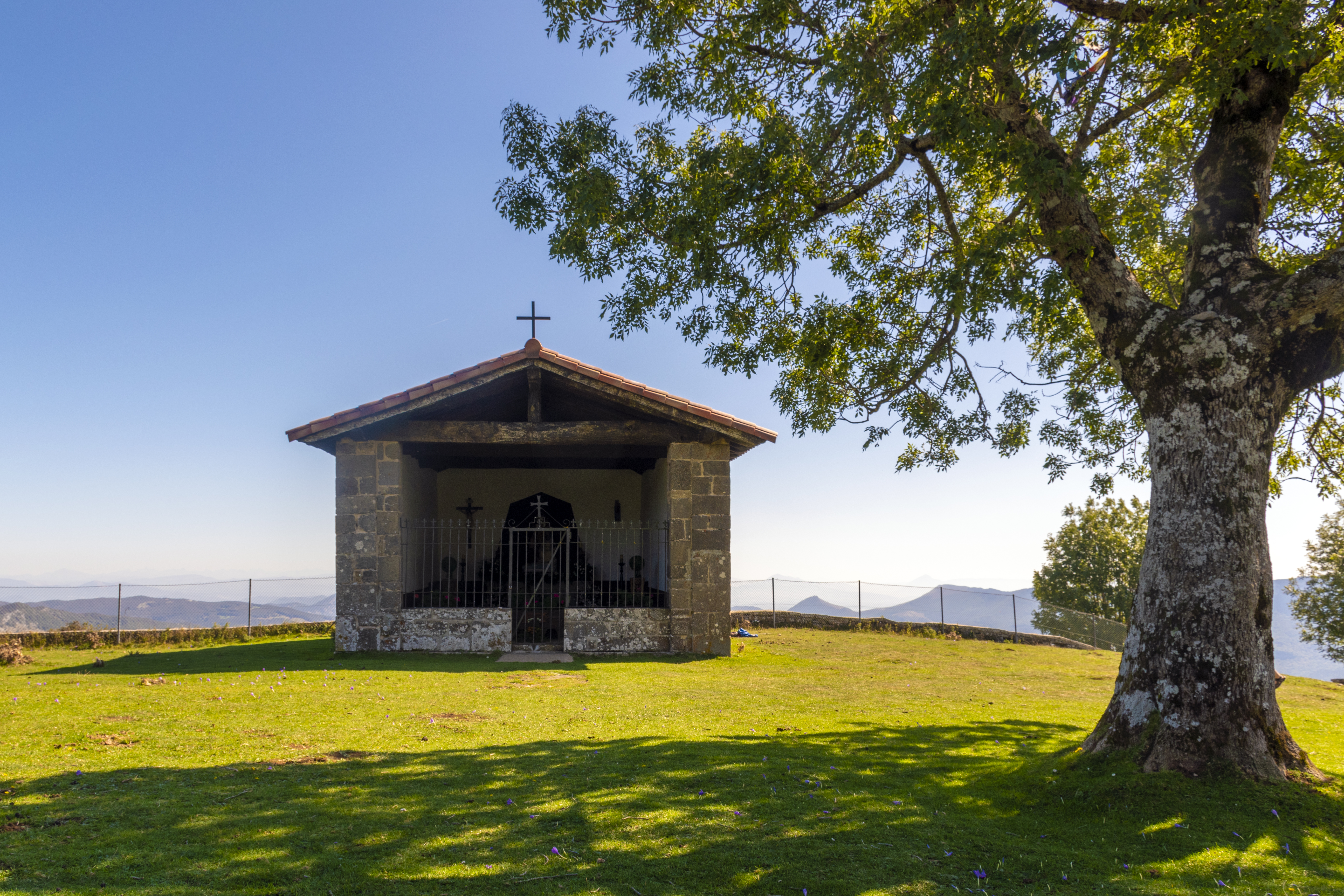 Done Mikel Aralarkoaren santutegia